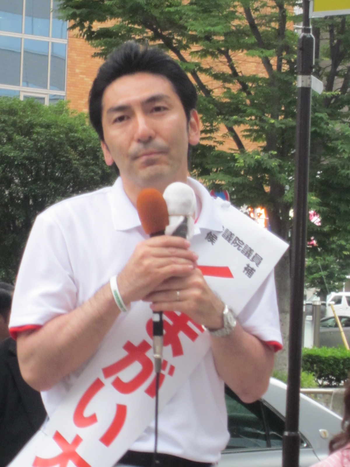 参議院議員・熊谷大。2016年6月22日、第24回参議院議員選挙宮城選挙区街頭演説にて。